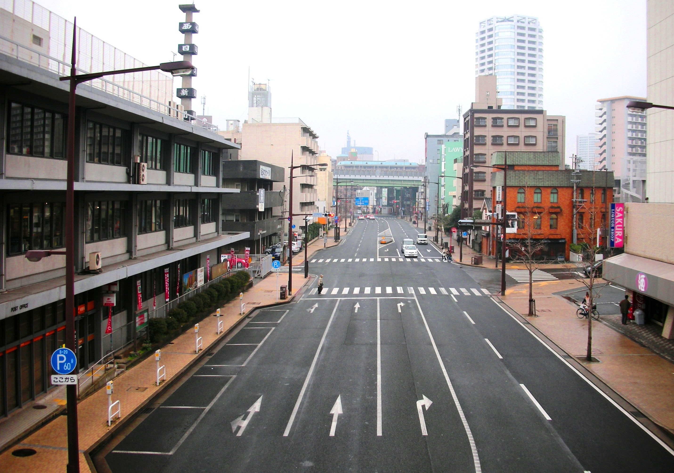 福岡県北九州市小倉北区田町の街並み